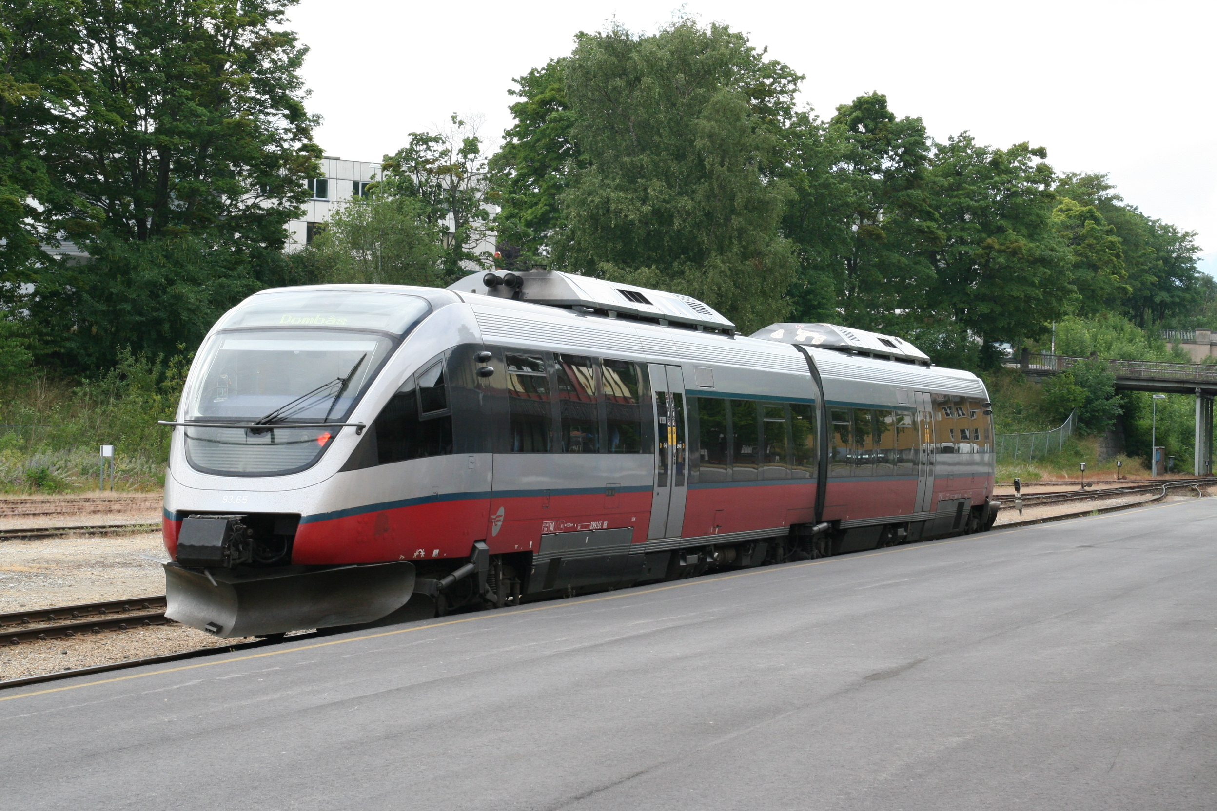 Type 93 2-carriage diesel multiple unit at Åndalsnes station.